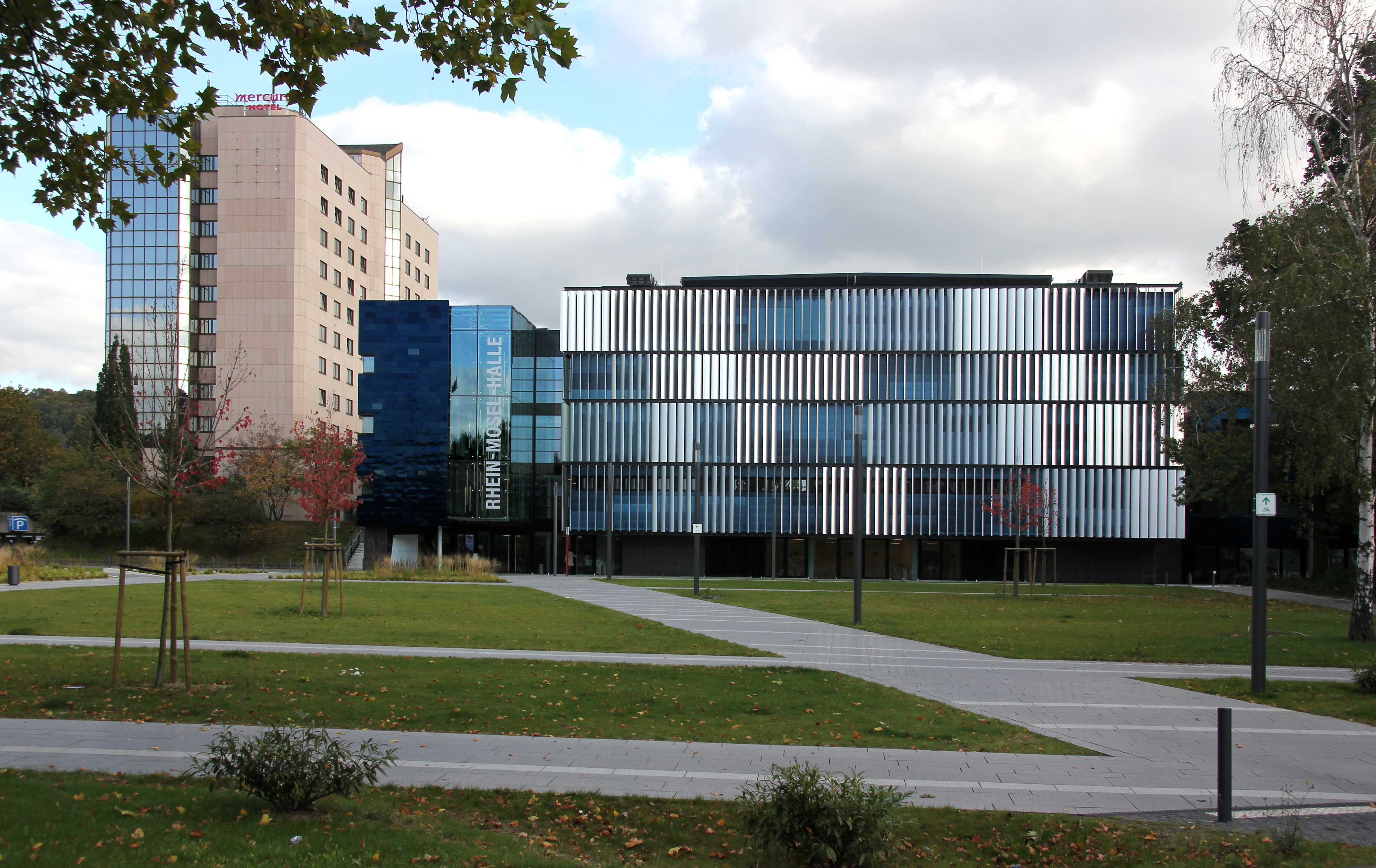 Rhein-Mosel-Halle in Koblenz nach dem Umbau